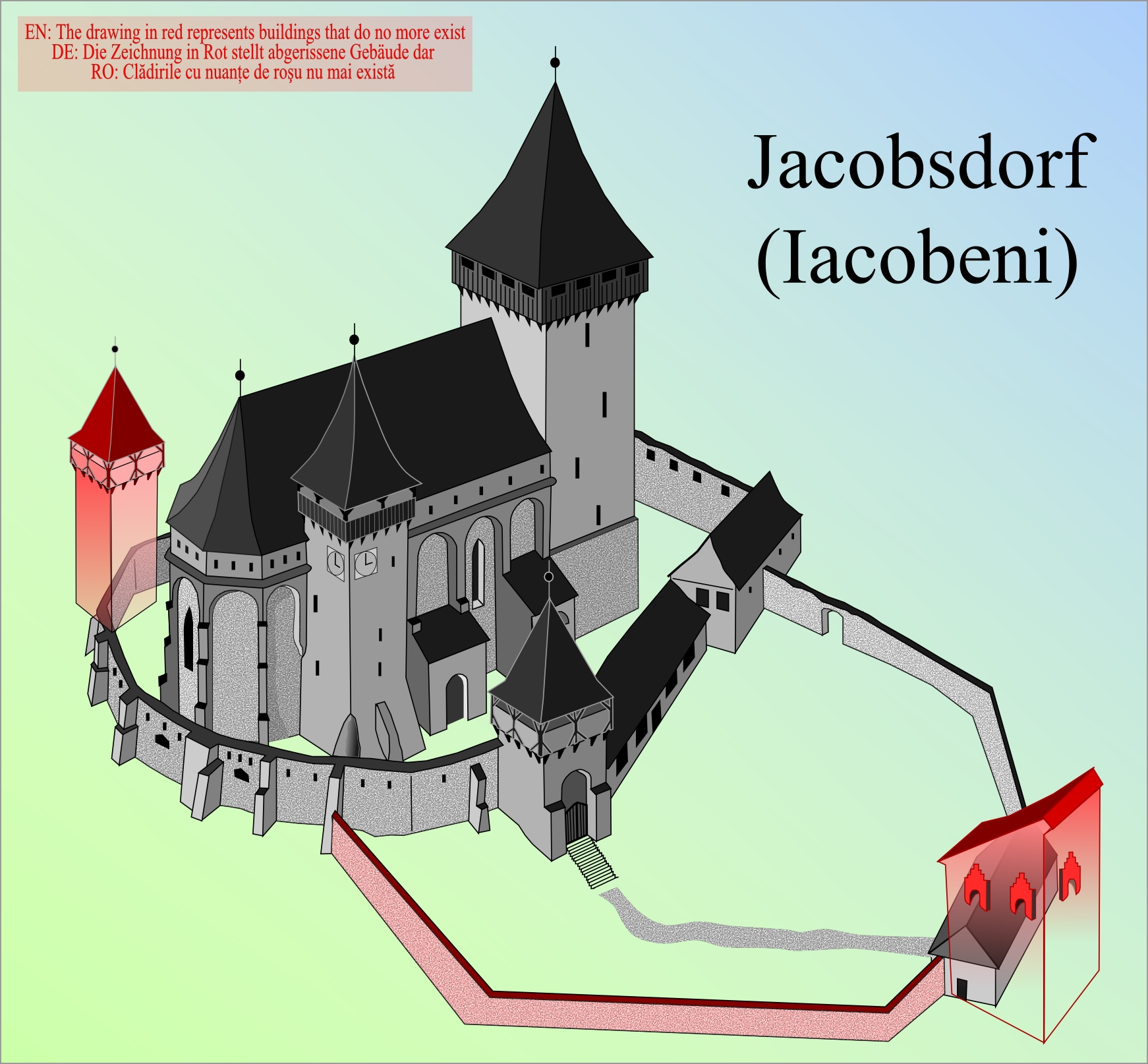 Biserica fortificata din Iacobeni.